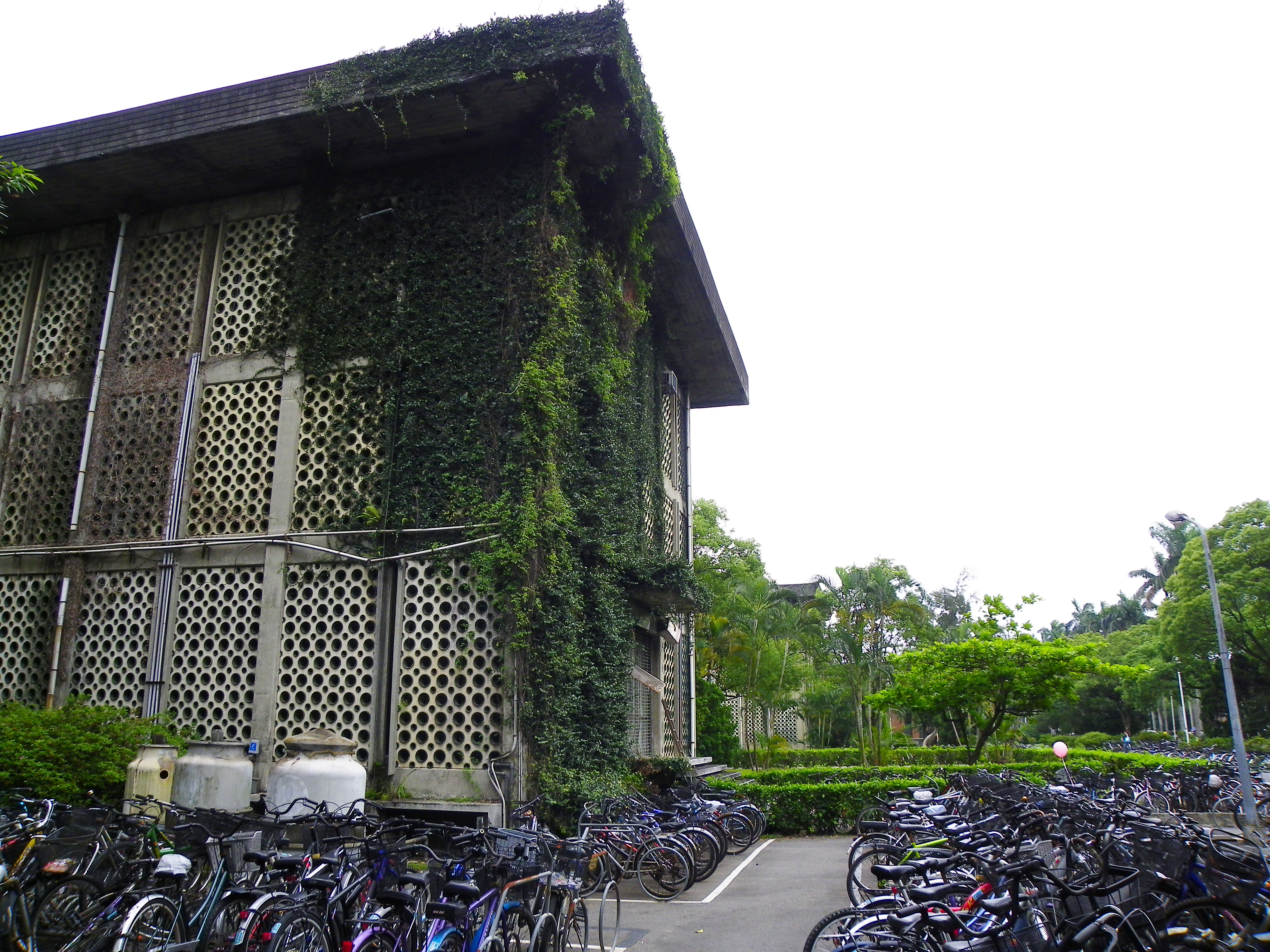 中文（台灣）: 從臺北市新生南路三段人行道東北眺望國立臺灣大學臺北校區哲學系館與遠方的人類學系館（兩棟俗呼洞洞館）南端，攝於前往臺大體育館PF12途中。